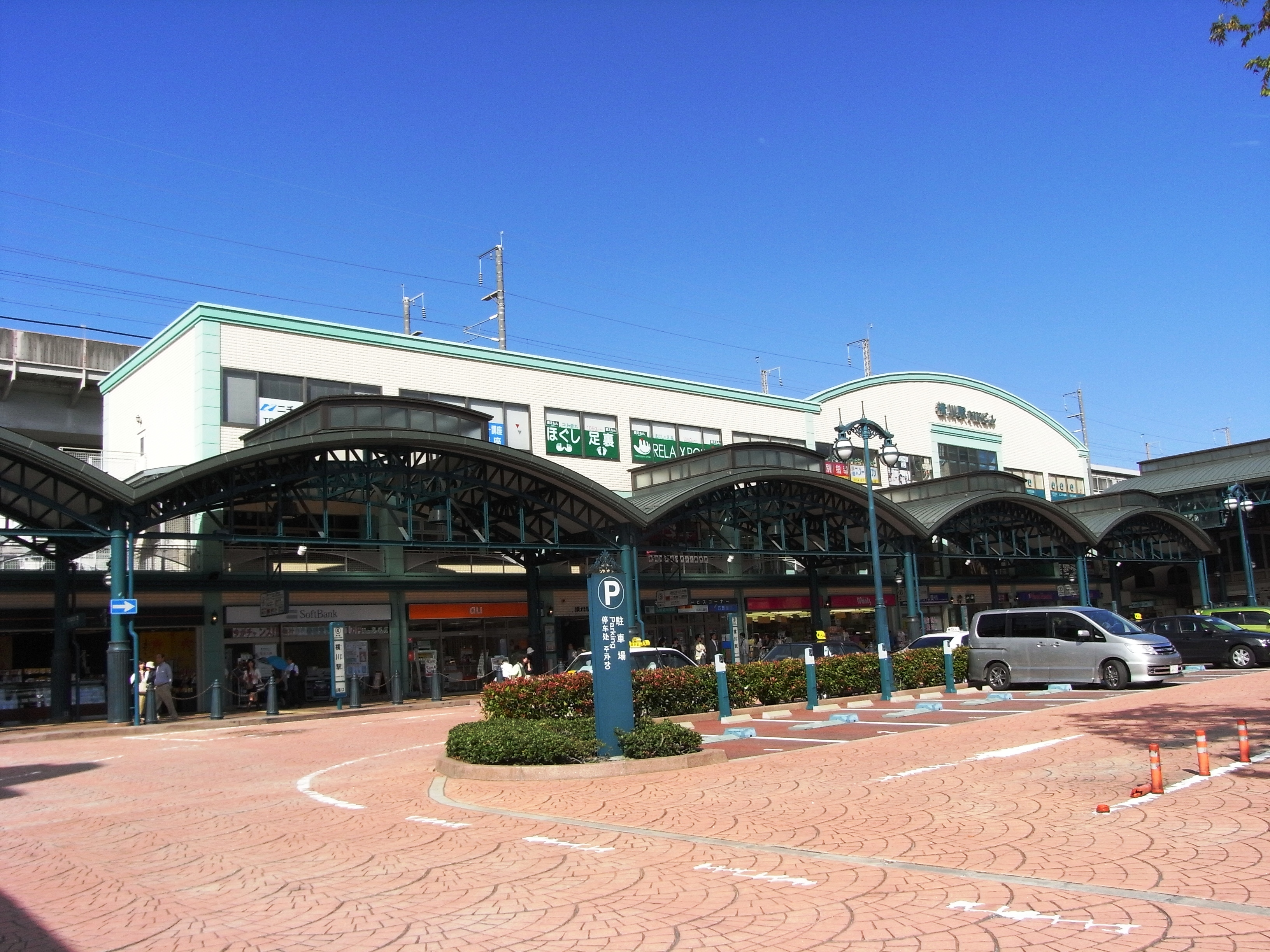 JR横川駅南口